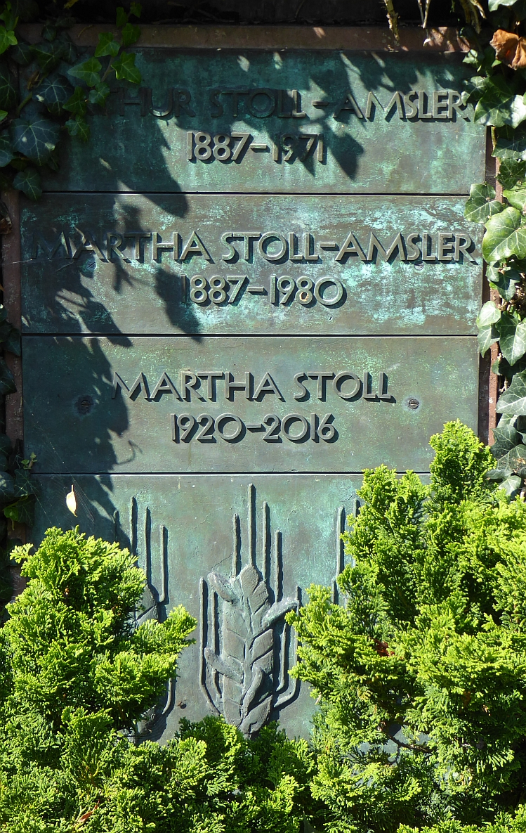 Arthur Stoll-Amsler (1887–1971) Biochemiker, Forscher, Sandoz Direktionspräsident. Grab auf dem Friedhof Bromhübel in Arlesheim.